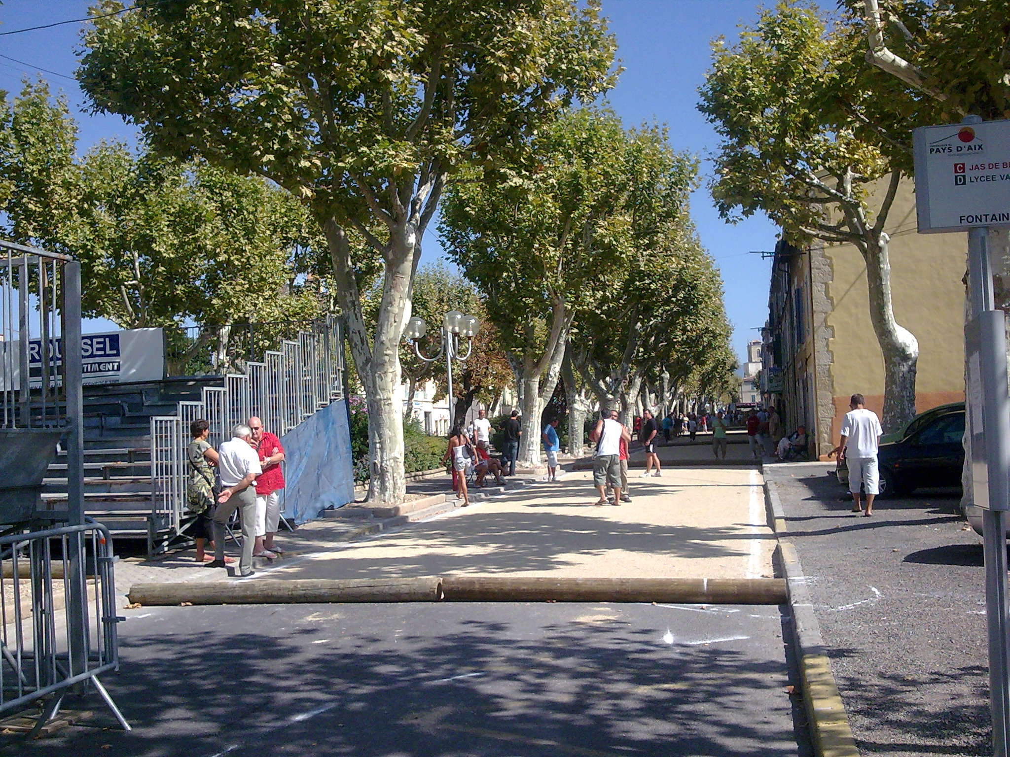 Prix bouliste a pertuis